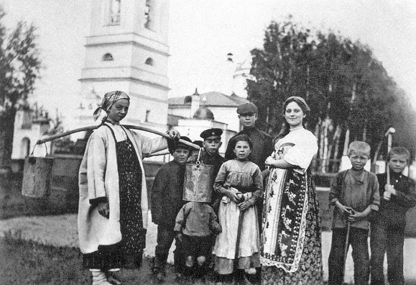 С. Есенин с земляками (во втором ряду справа в кепке). Село Константиново. 1909 г.